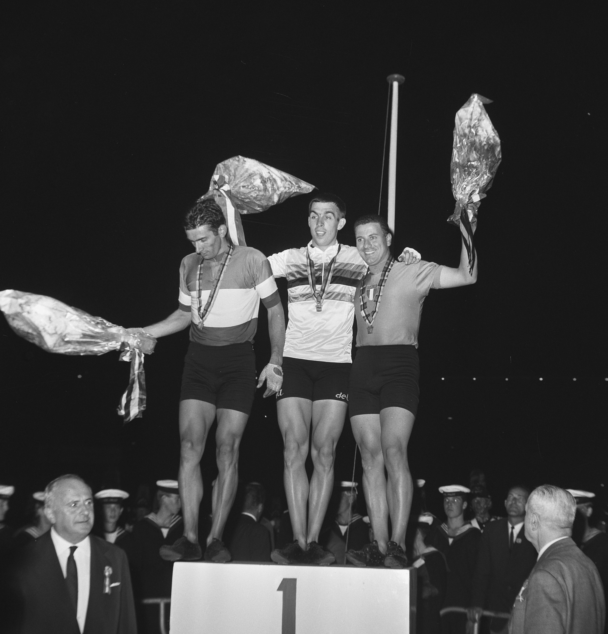 WK Wielrennen op de baan sprint profs finale. Beghetto (2), Sercu (WK), Damiano (3)